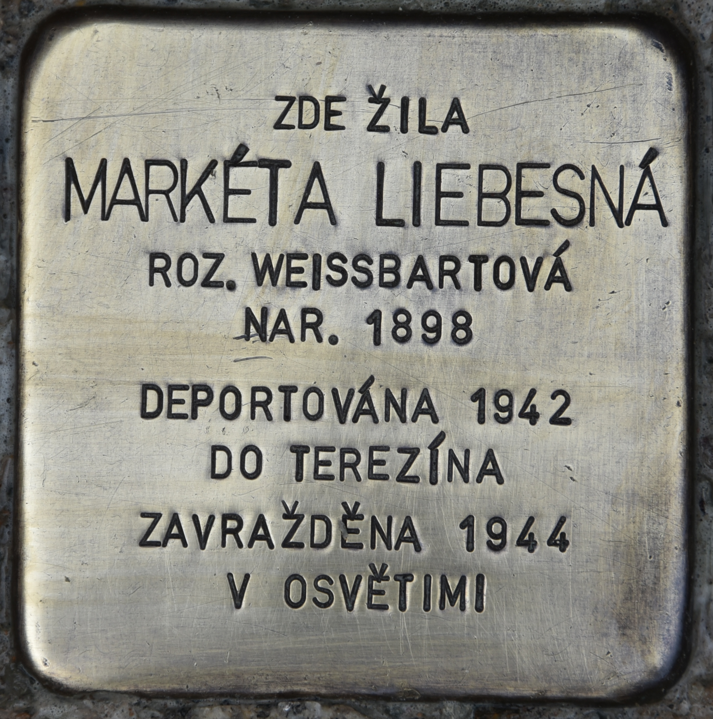 Stolperstein für Marketa Liebesna